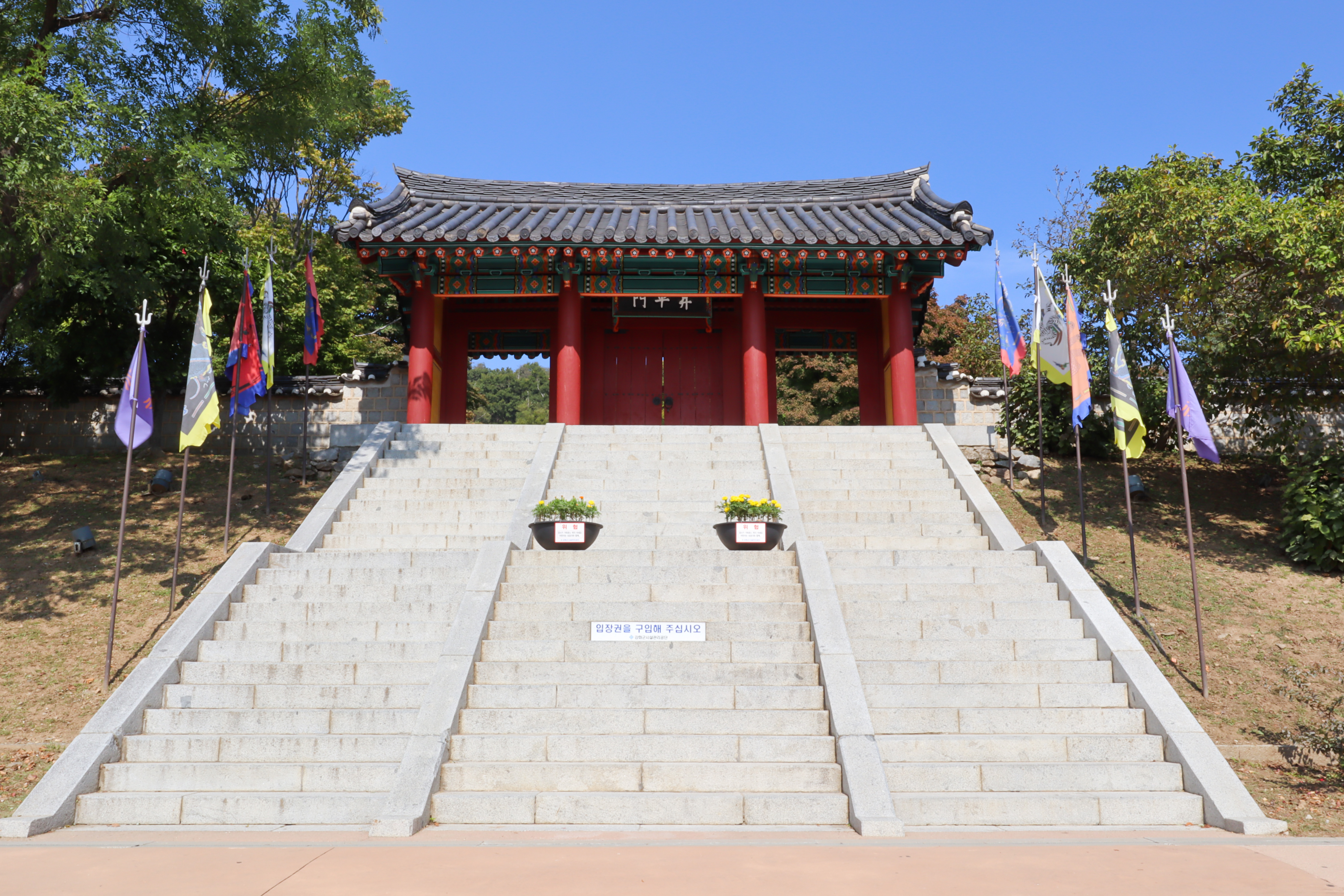 Goryeo Palace 고려궁지 입구